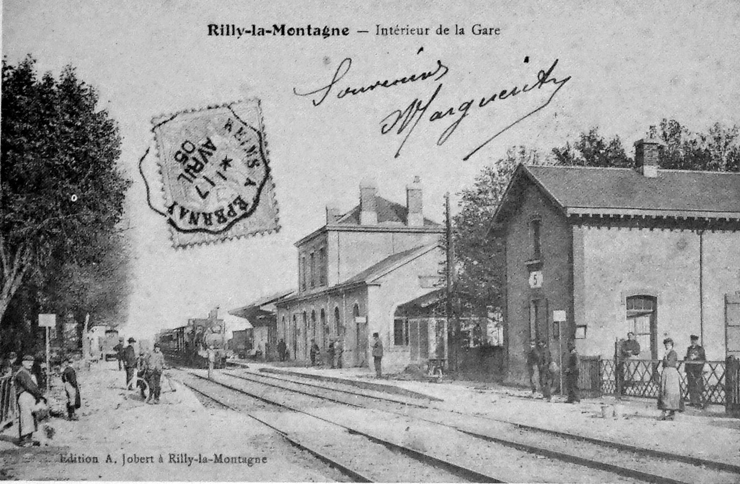 carte postale ancienne.